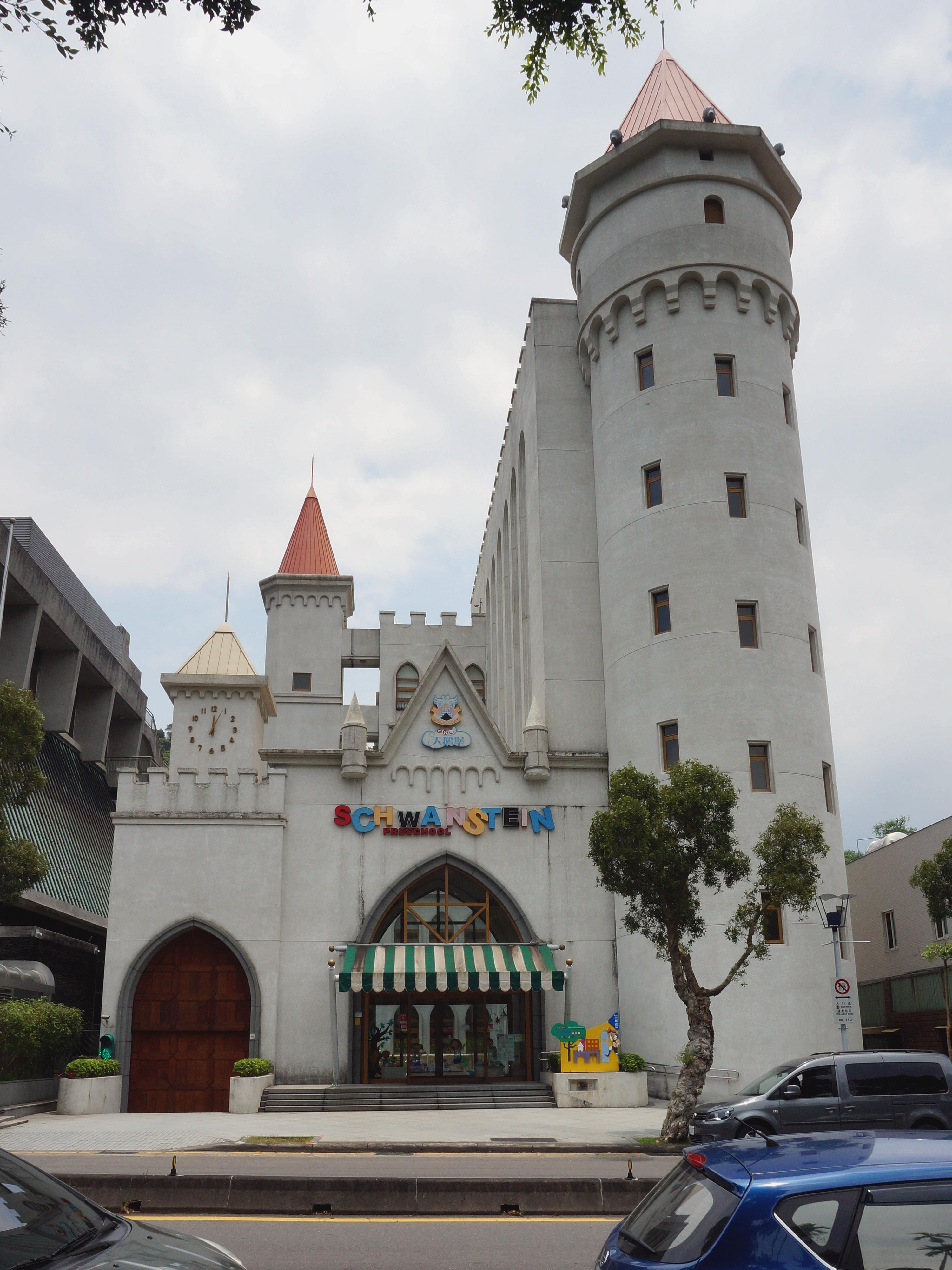 臺北市私立天鵝堡幼兒園，隸屬林迺翁文教基金會，地址：臺北市士林區至善路二段280之1號。